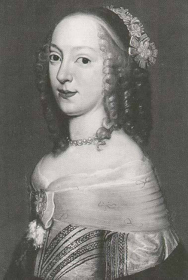 Klara Augusta (1632-1700)), Tochter von August der Jüngere (Braunschweig-Wolfenbüttel)